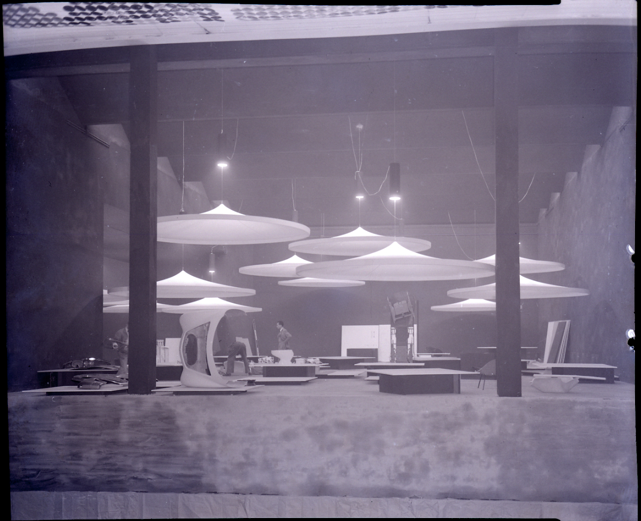 Servizio fotografico : Milano, 1954 / Paolo Monti. - Buste: 22, Fototipi: 24 : Negativo b/n, gelatina bromuro d'argento/ pellicola ; 10x12. - ((Serie costituita da 24 negativi identificati con i nn.: 2195-21218. La suddetta serie è contenuta nella scatola identificata con la numerazione 21154-21281. Sulla scatola manoscritto con pennarello nero: "1/ X Triennale". La scatola è a sua volta contenuta in una scatola grande col coperchio giallo. - Occasione: Documentazione della X Triennale del 1954, intitolata "Prefabbricazione - Industrial Design: Esposizione Internazionale delle Arti Decorative e Industriali Moderne e dell'Architettura Moderna". L'esposizione si tenne presso il Palazzo dell'Arte